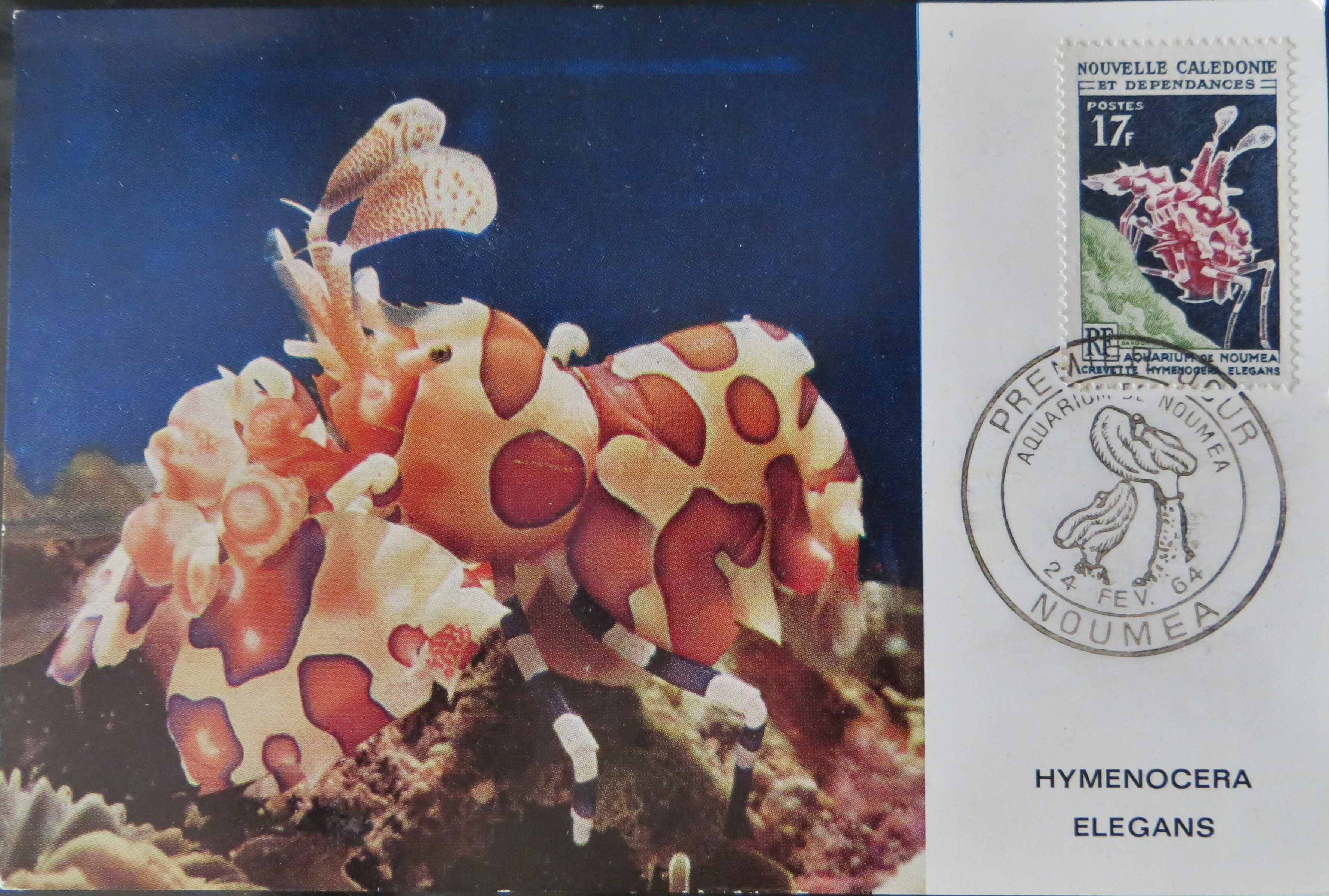 Une enveloppe timbrée à l'effigie de la crevette arlequin (Hymenocera picta, anciennement E. elegans), de Nouvelle-Calédonie.